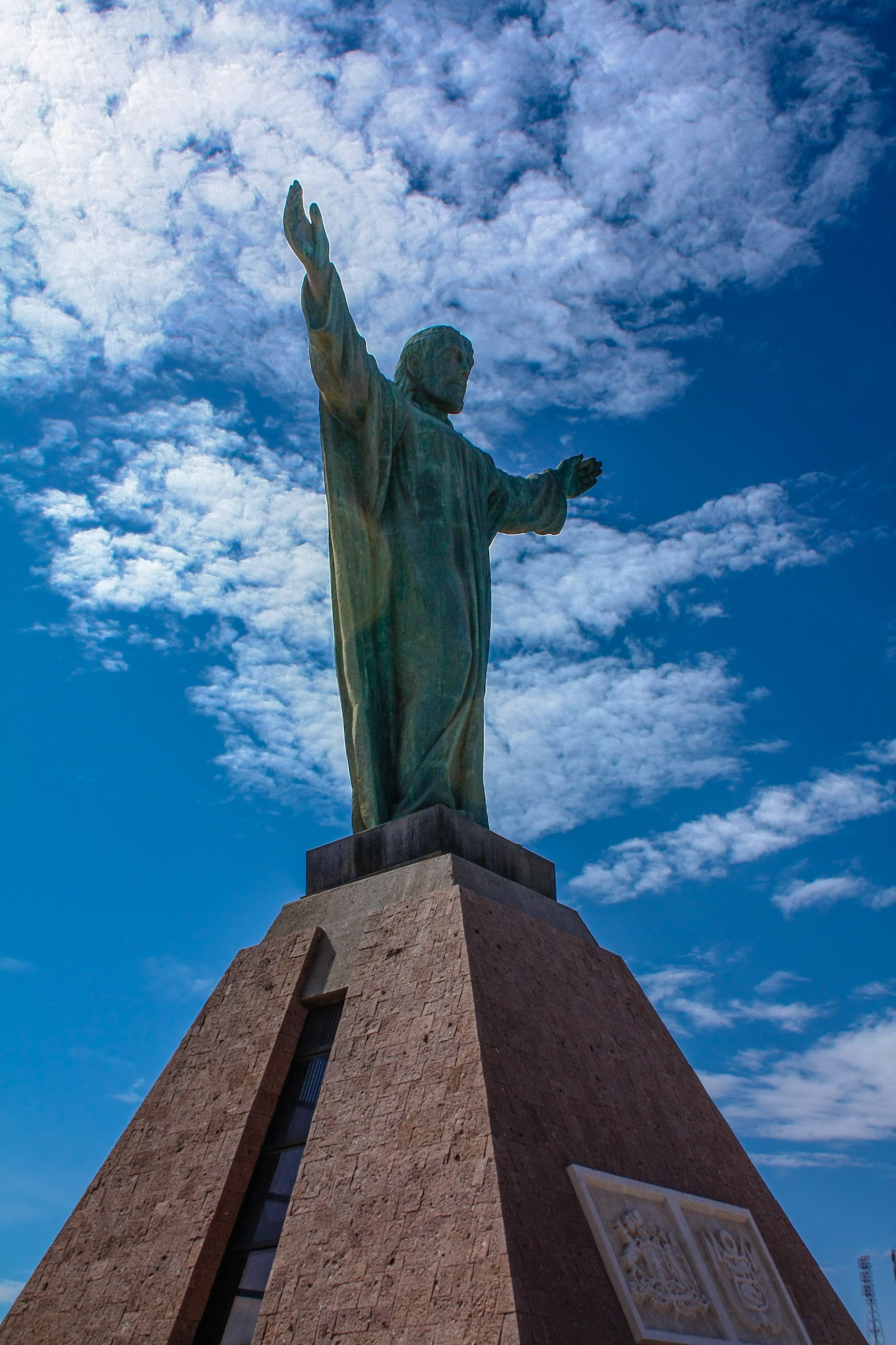 Morro de Arica This is a photo of a national monument in Chile: 521